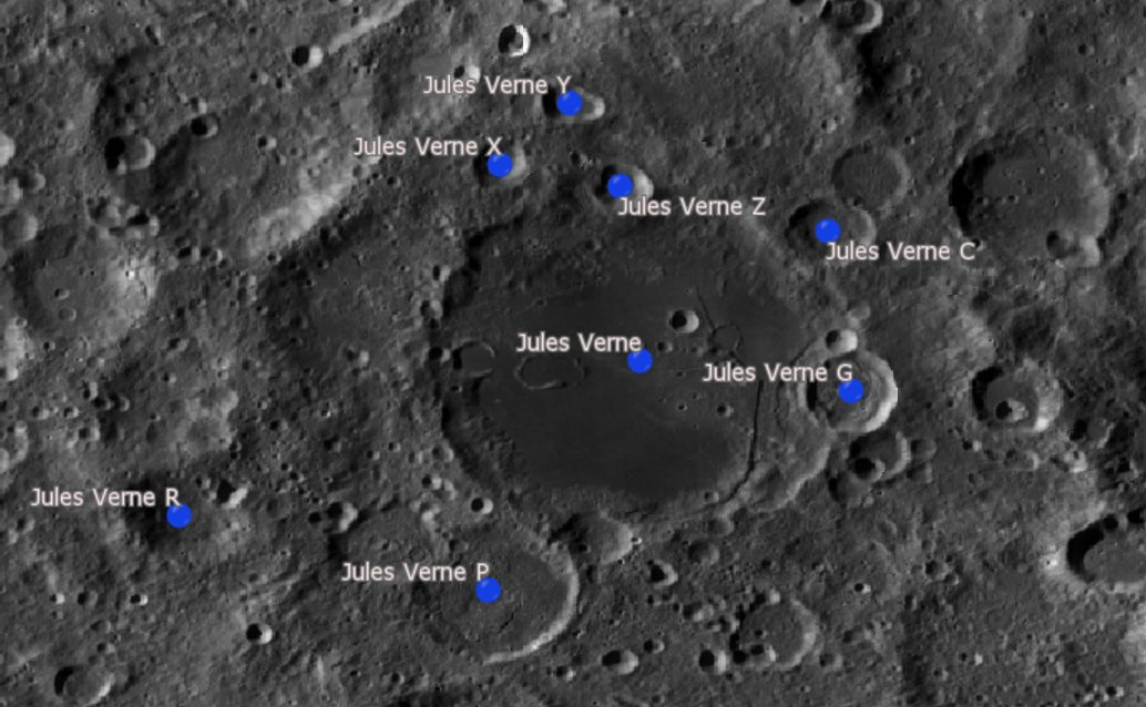 Cráter lunar Jules Verne. Cráteres satélite. (Imagen LRO)